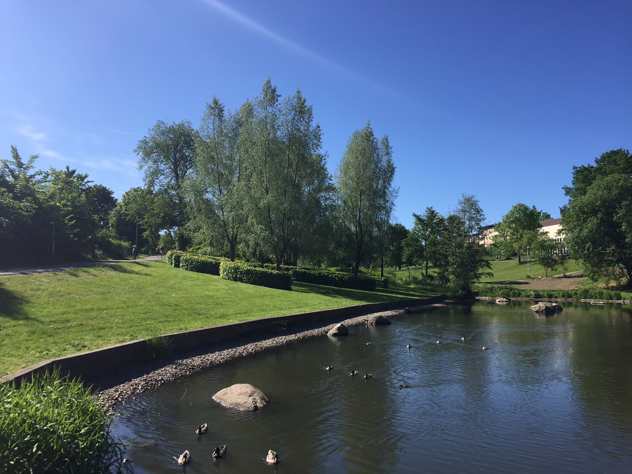 Damm i Ekhagsravinen i Ekhagen, Jönköping